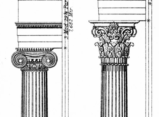 Die klassischen Säulenordnungen der Antike – Tafel zum Artikel „Baukunst“, S. 194